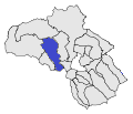 Mapa elaborat a partir d'un altre mapa de lliure disposició.